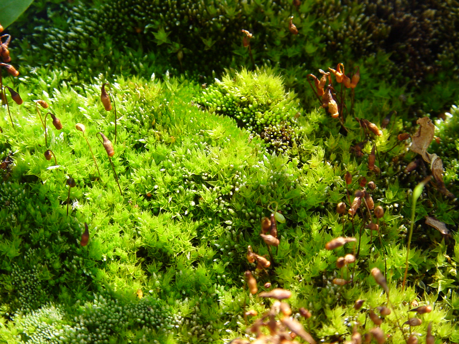 Moos